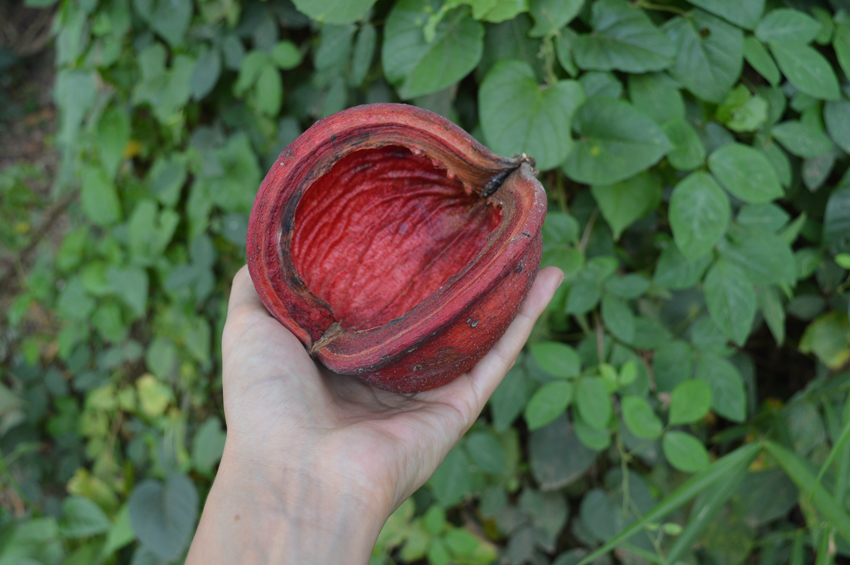 Половина стручка яванської оливи.